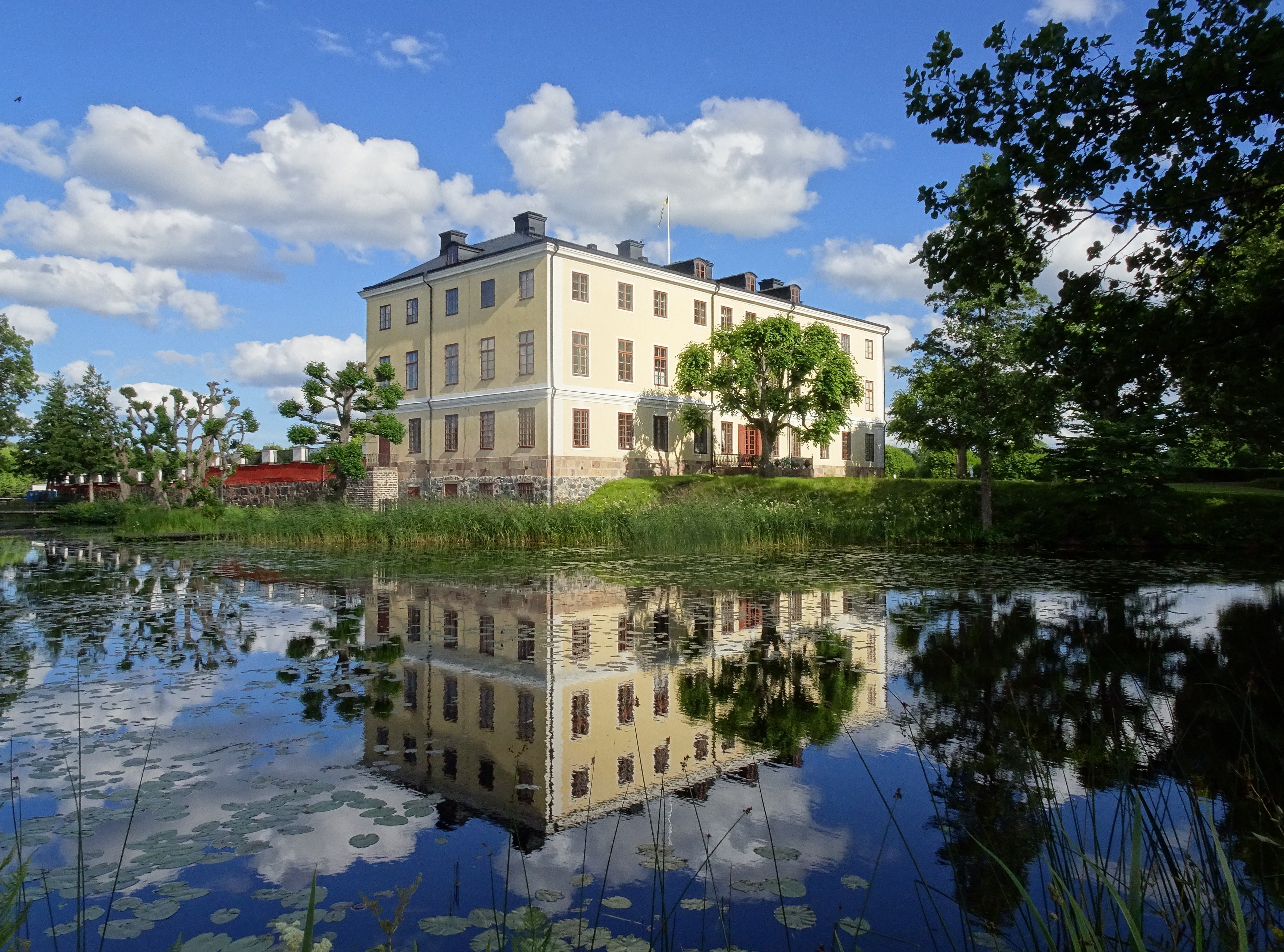 Forsmarks herrgård, från engelska parken